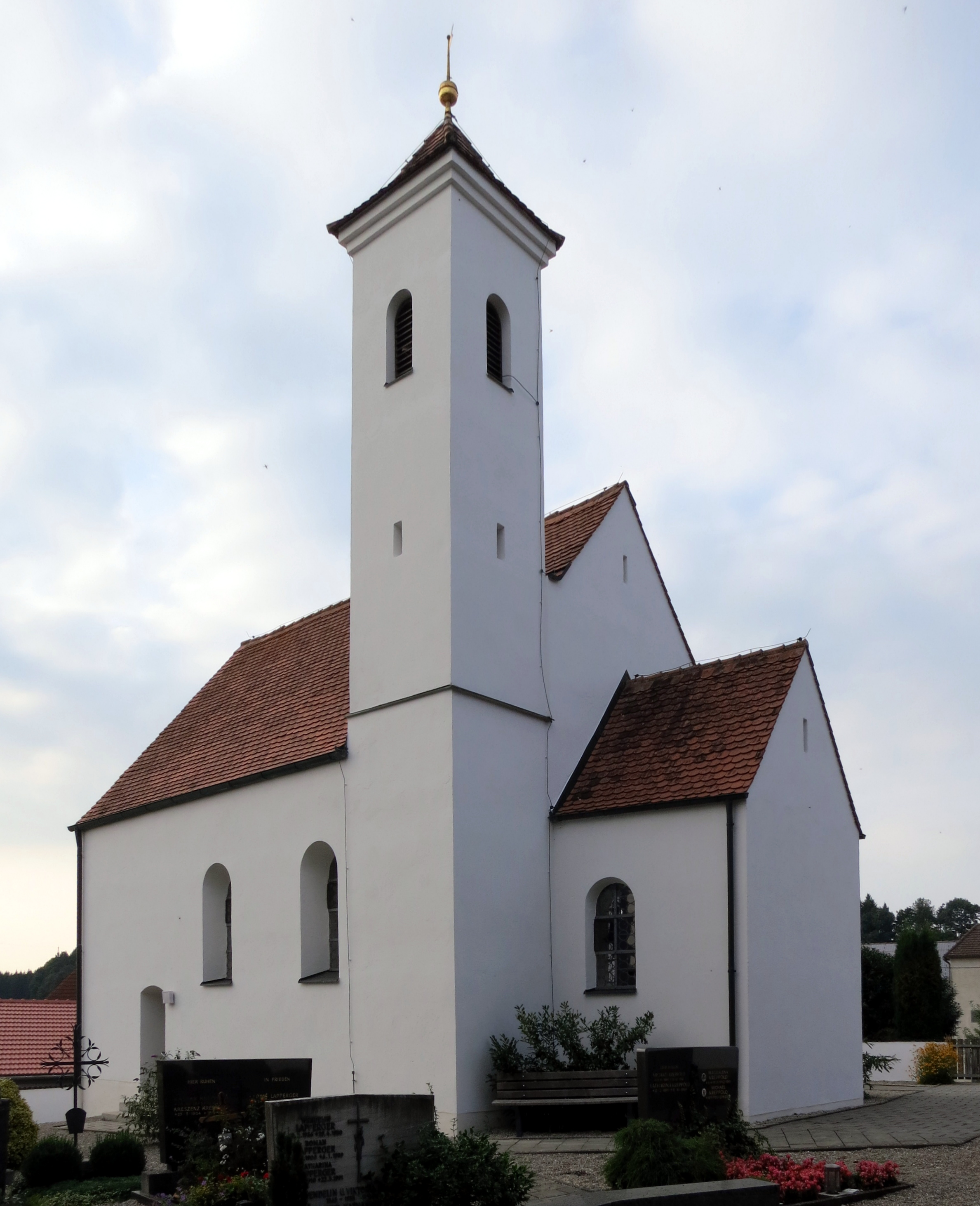 Die Kirche St. Laurentius in Pfaffenhofen, Ansicht aus SüdOst